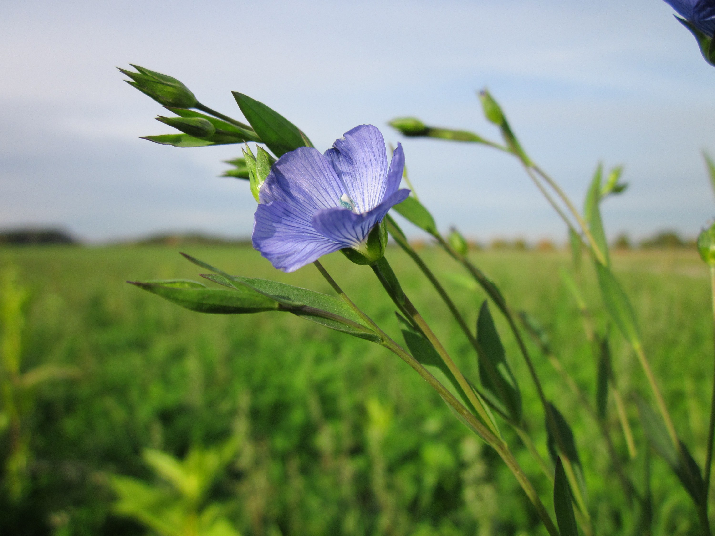 Gemeiner Lein (Linum usitatissimum) in einem Sonnenblumenfeld bei Neulußheim